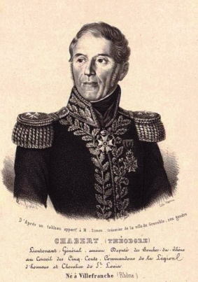 Théodore Chabert (1758-1845), général de division et baron de l'Empire.